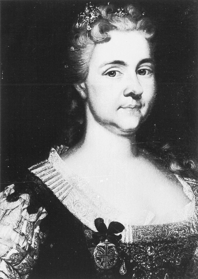 Maria Eleonore von Dernbach (1680-1718), geborene Gräfin von Hatzfeld, Gemahlin des Rudolf Franz Erwein von Schönborn, Pommersfelden, Schloss Weissenstein — Foto Marburg, Aufnahme-Nr. LA 1.122/24